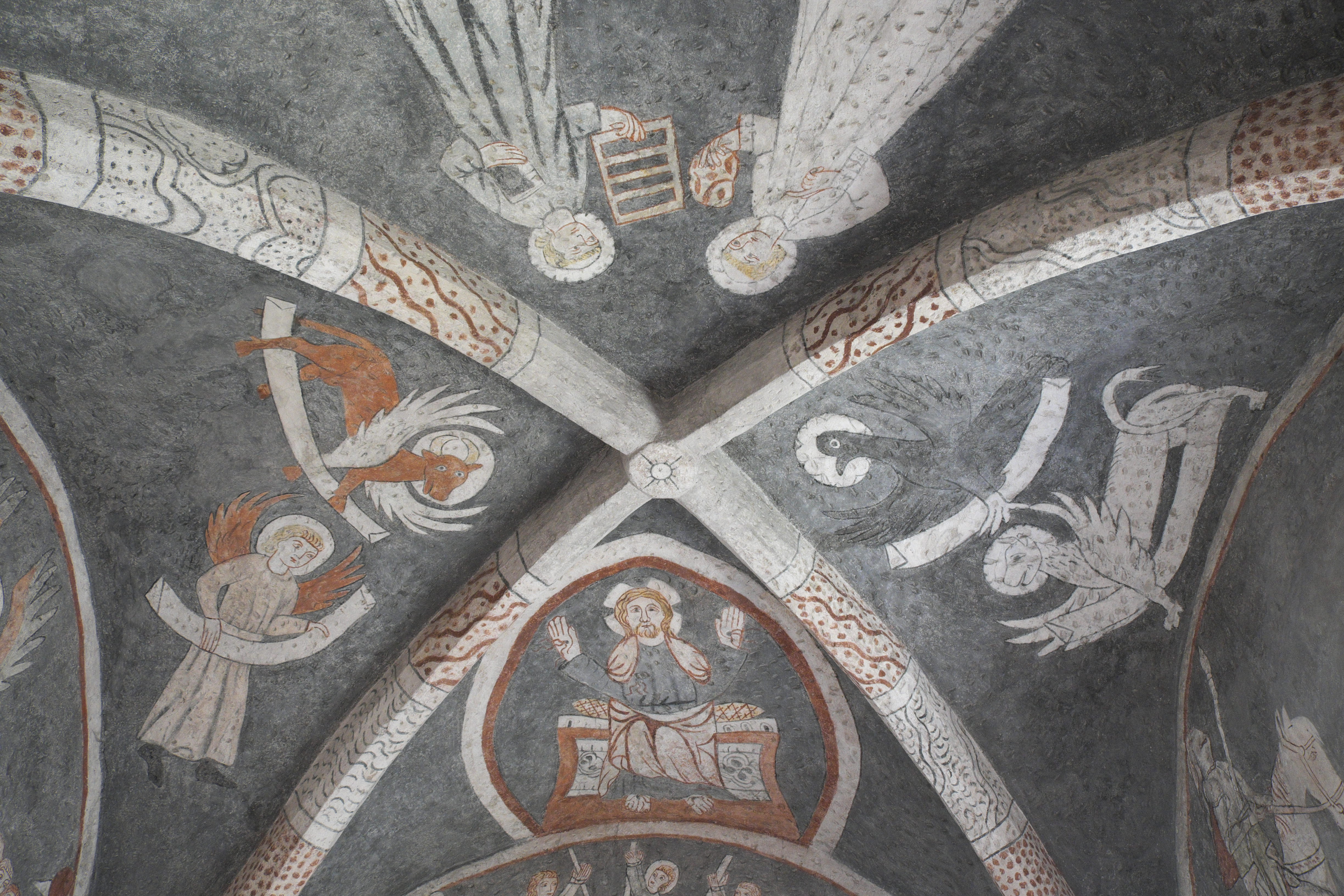 Katholische Pfarrkirche St. Vitus in Kottingwörth (Beilngries) im oberbayerischen Landkreis Eichstätt (Bayern/Deutschland), Wand- und Deckenmalereien in der Vituskapelle, in Fresko- und Seccotechnik, wohl nach 1313 entstanden